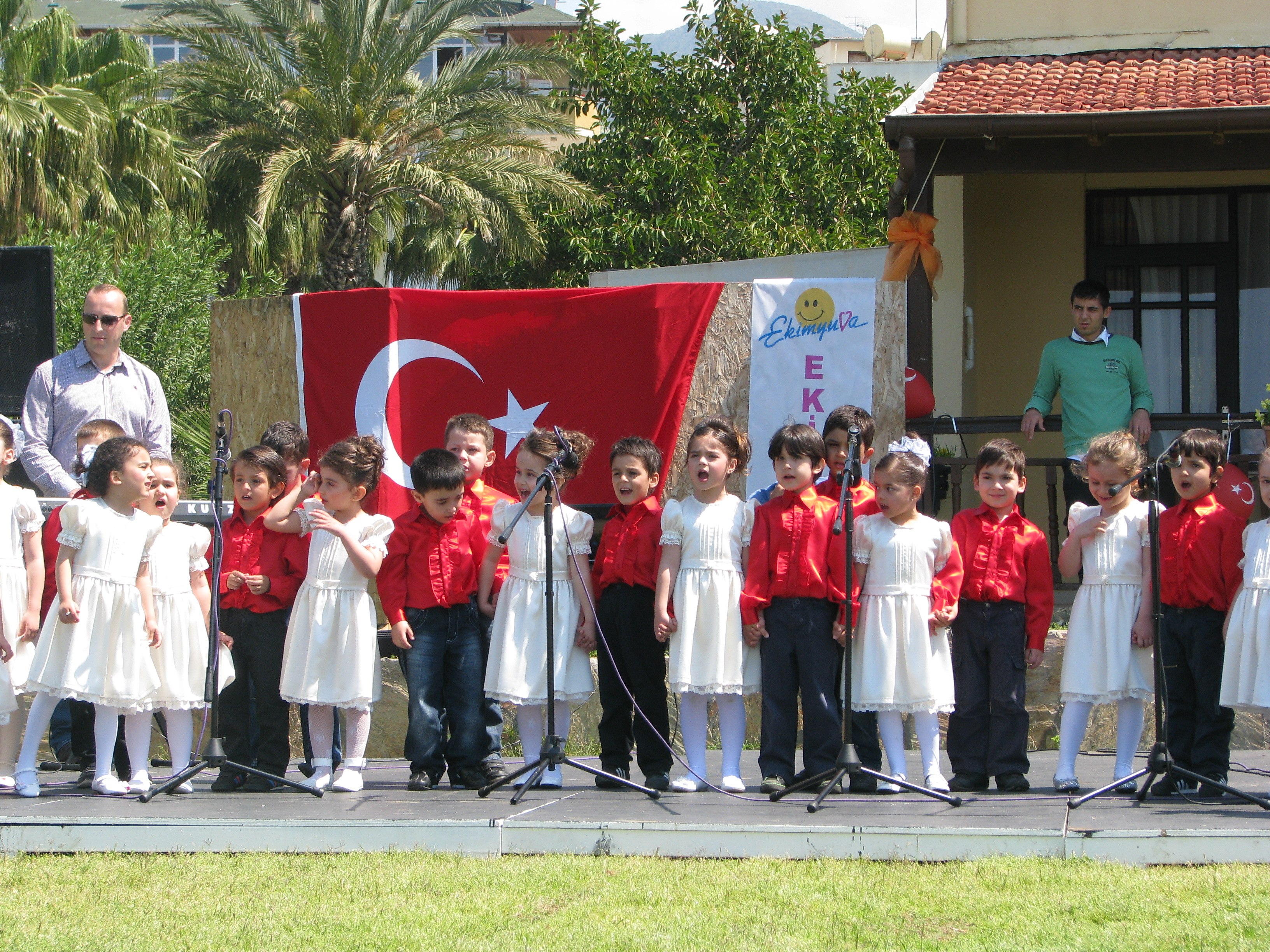 tr:23 Nisan Ulusal Egemenlik ve Çocuk Bayramında anaokulu öğrencileri.